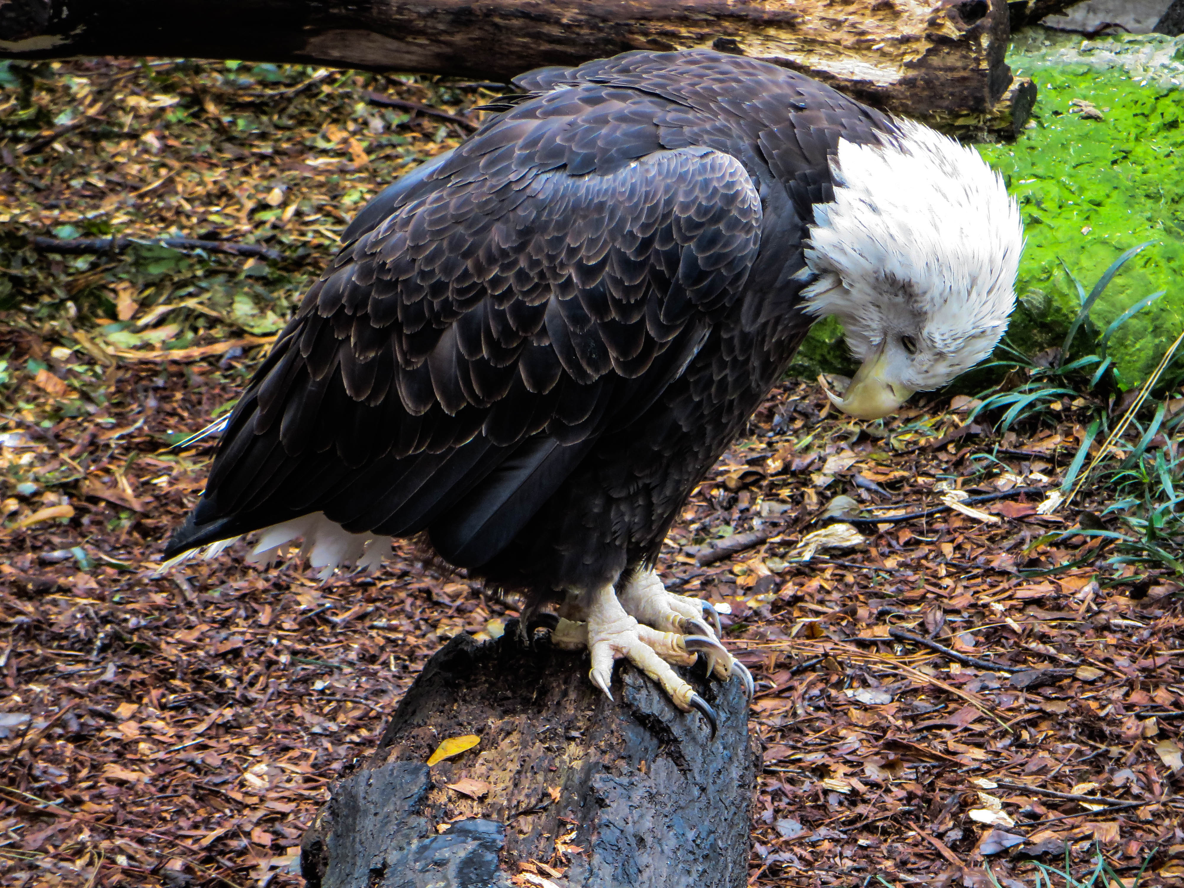 OK, What did i just step into?